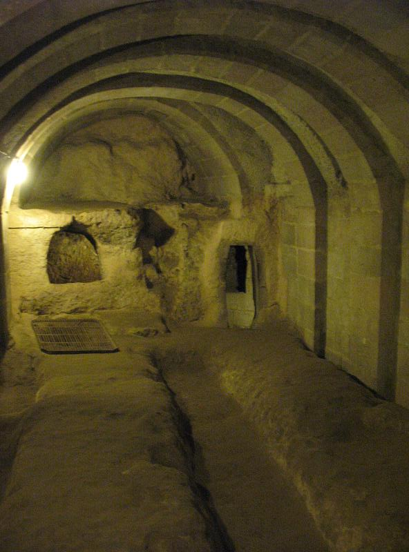 Derinkuyu - school